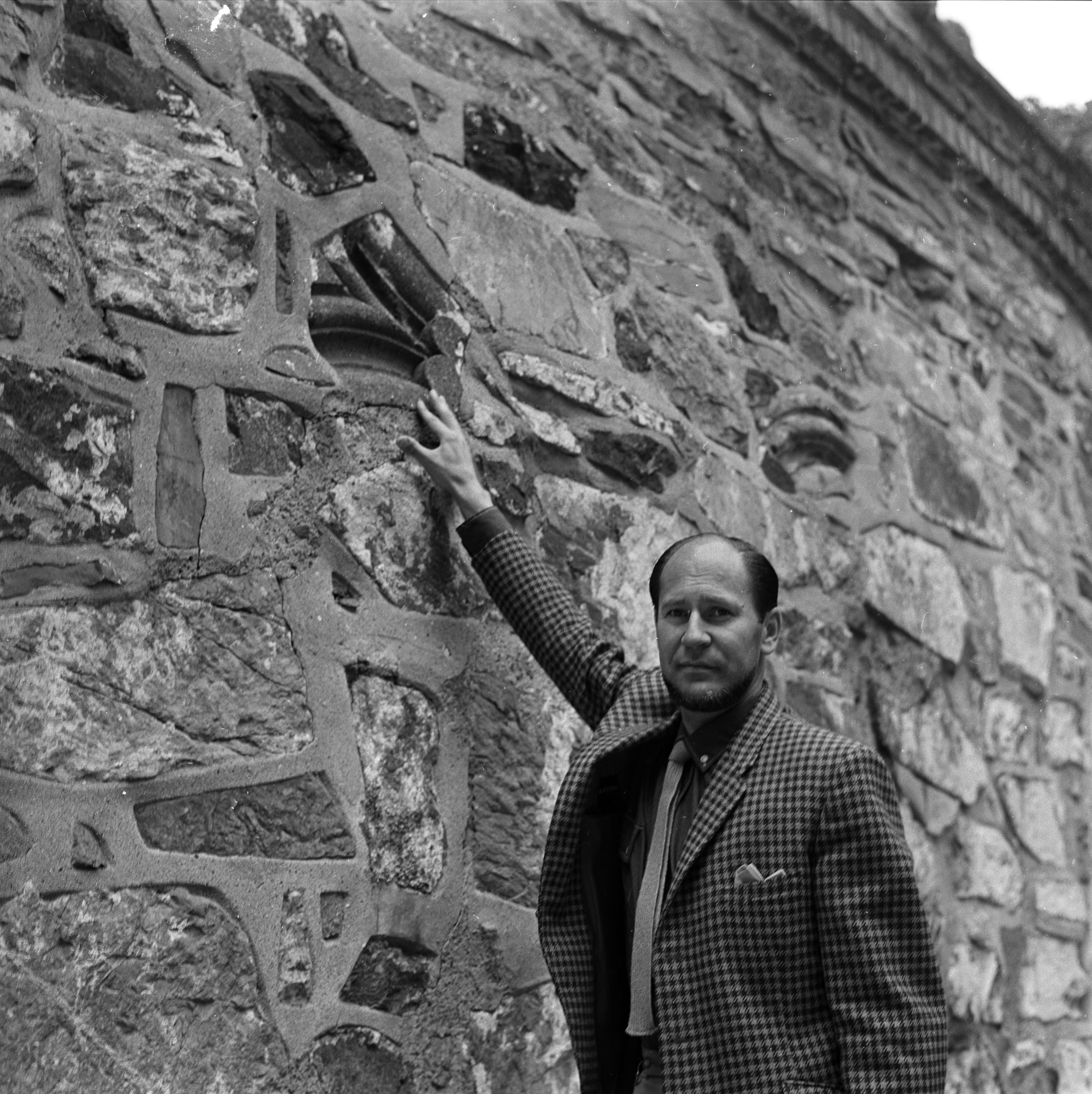 Akershus slott og festning, Oslo, august 1964. Stephan Tschudi-Madsen ved mur.